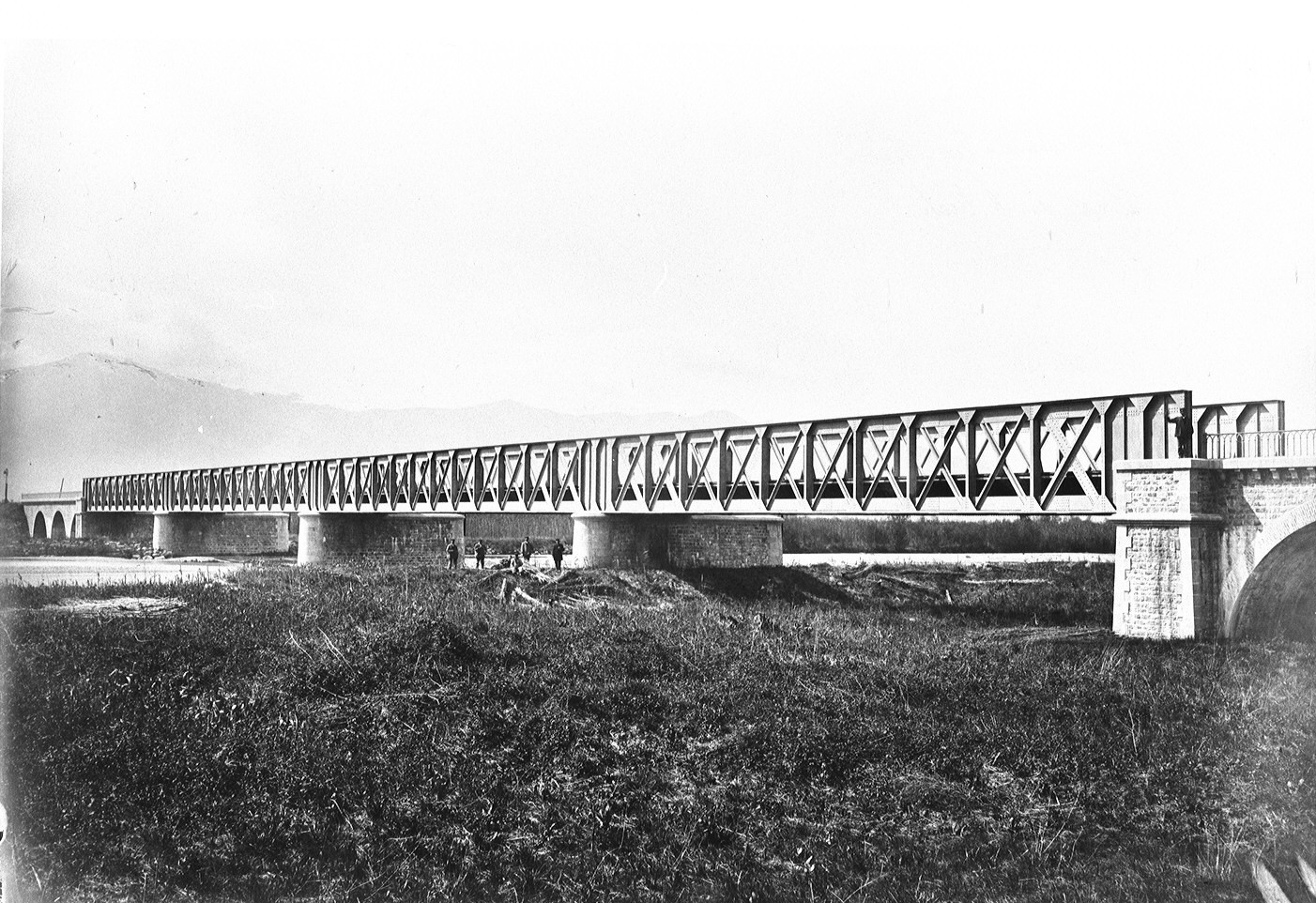 Pont sur le Tech, du chemin de fer de Narbonne à Portbou, construit par la Compagnie du Midi